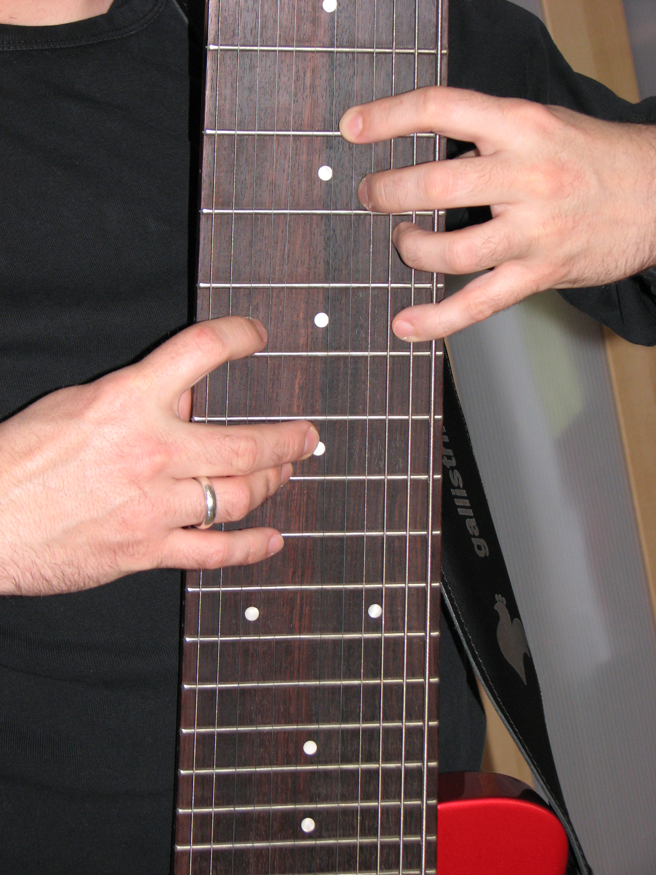 Das Koyabu Board wird mit beiden Händen gleichzeitig getappt. Vergleichbar ist diese Technik durchaus auch mit dem Klavierspiel - nur dass auf diesem Instrument an Stelle der Tasten Saiten angeschlagen werden.